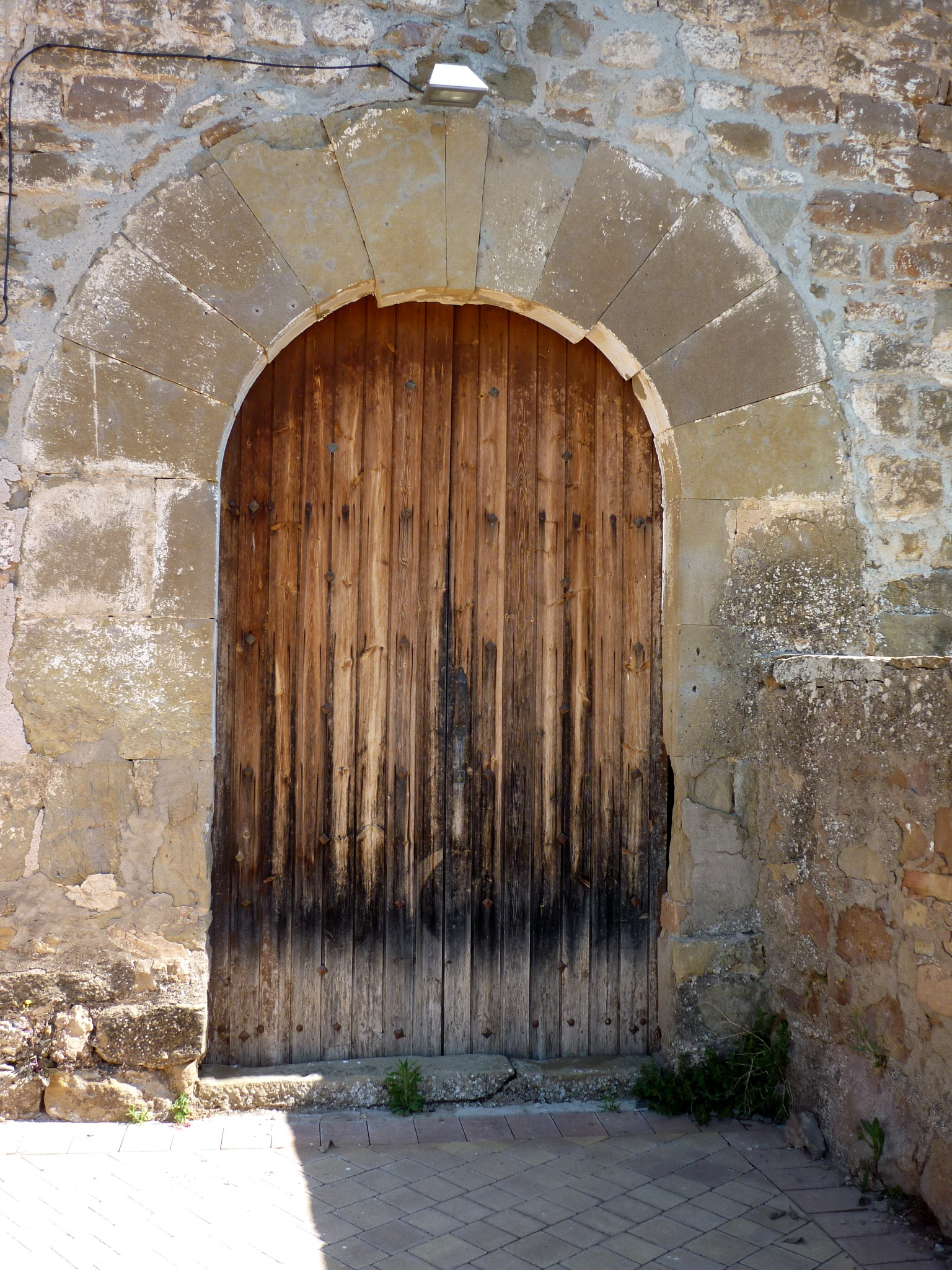 Església parroquial de Sant Iscle i Santa Victòria de la Torre de Rialb: portalada (la Baronia de Rialb)